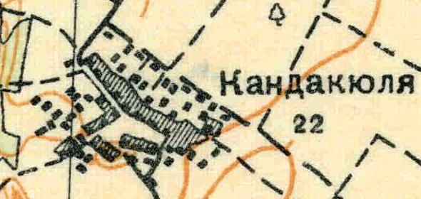 Топографическая карта Ленинградской области, квадрат О-35-24-А-в (Торосово), деревня Кандакюля